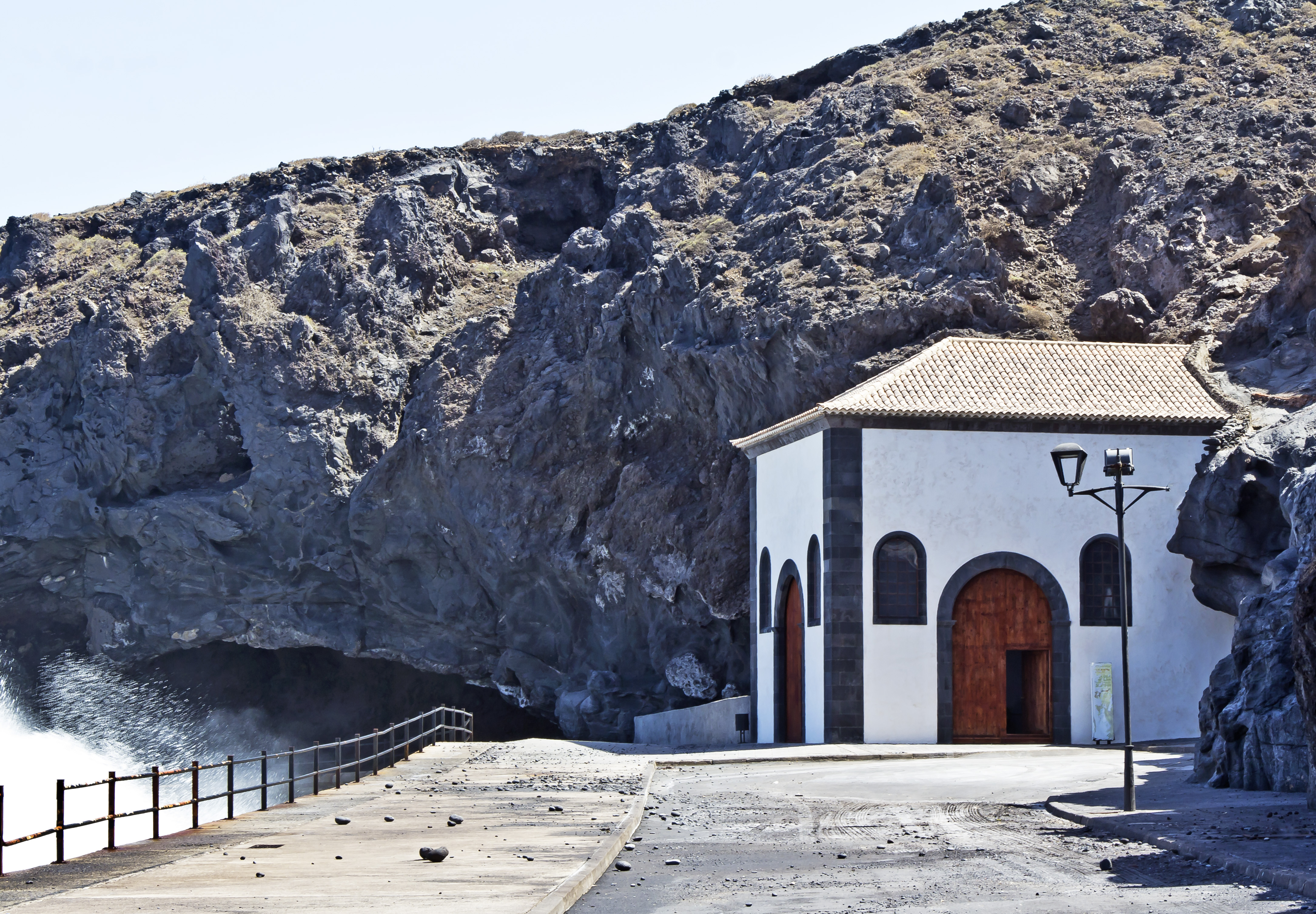 Die Ermita San Blas wurde vor die Höhle de San Blas gebaut. In dieser Höhle, die damals Cueva Achbinico genannt wurde, bewahrten die Guanchen vor der Eroberung der Insel durch die Kastilier die Figur der der Jungfrau von Candelaria auf.